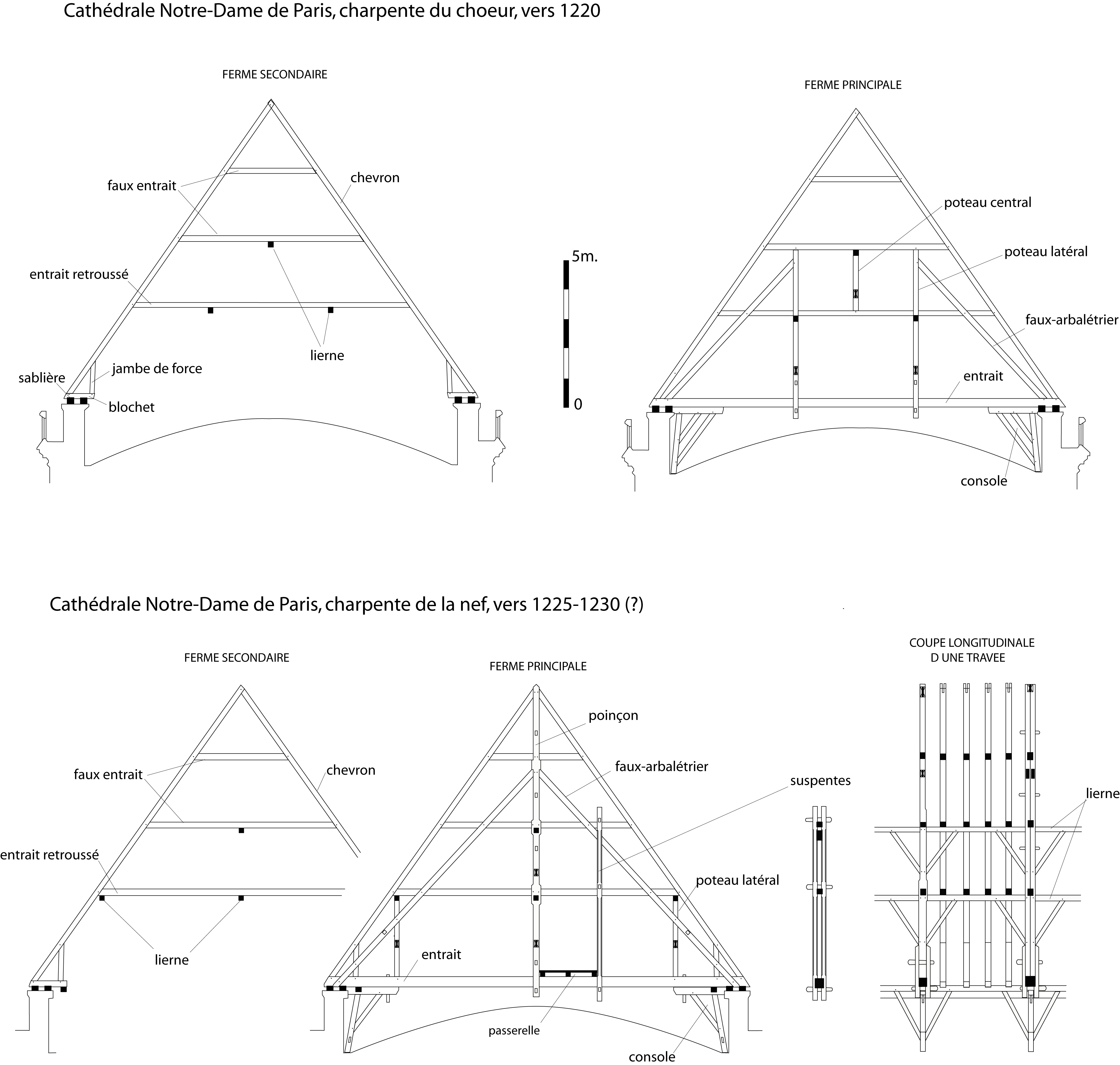 La charpente de la nef est plus tardive et plus complexe que du choeur, construite quelques années auparavant vers 1220 d'après les analyses dendrochronologiques